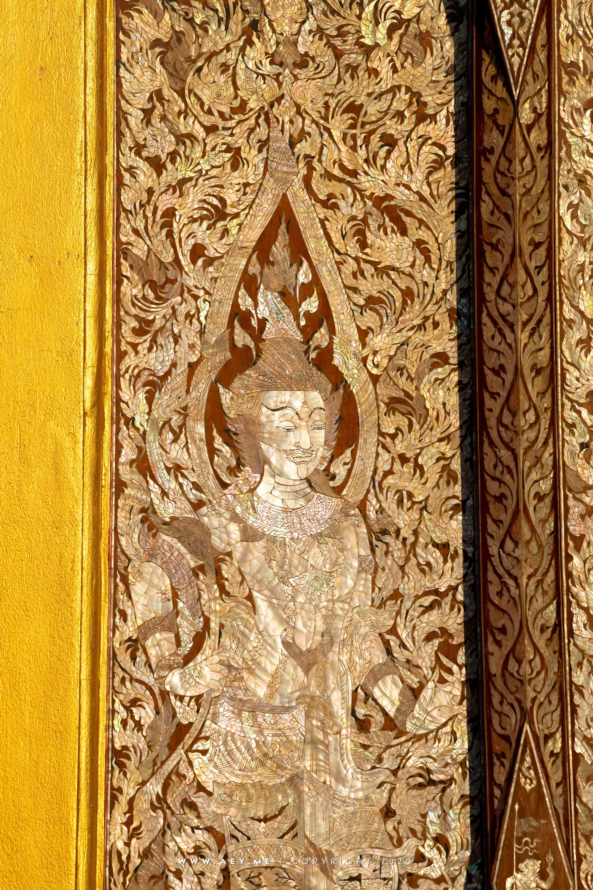 ท้าววิรูปักษ์ บานประตูประดับมุก พระวิหารหลวง วัดคฤหบดี